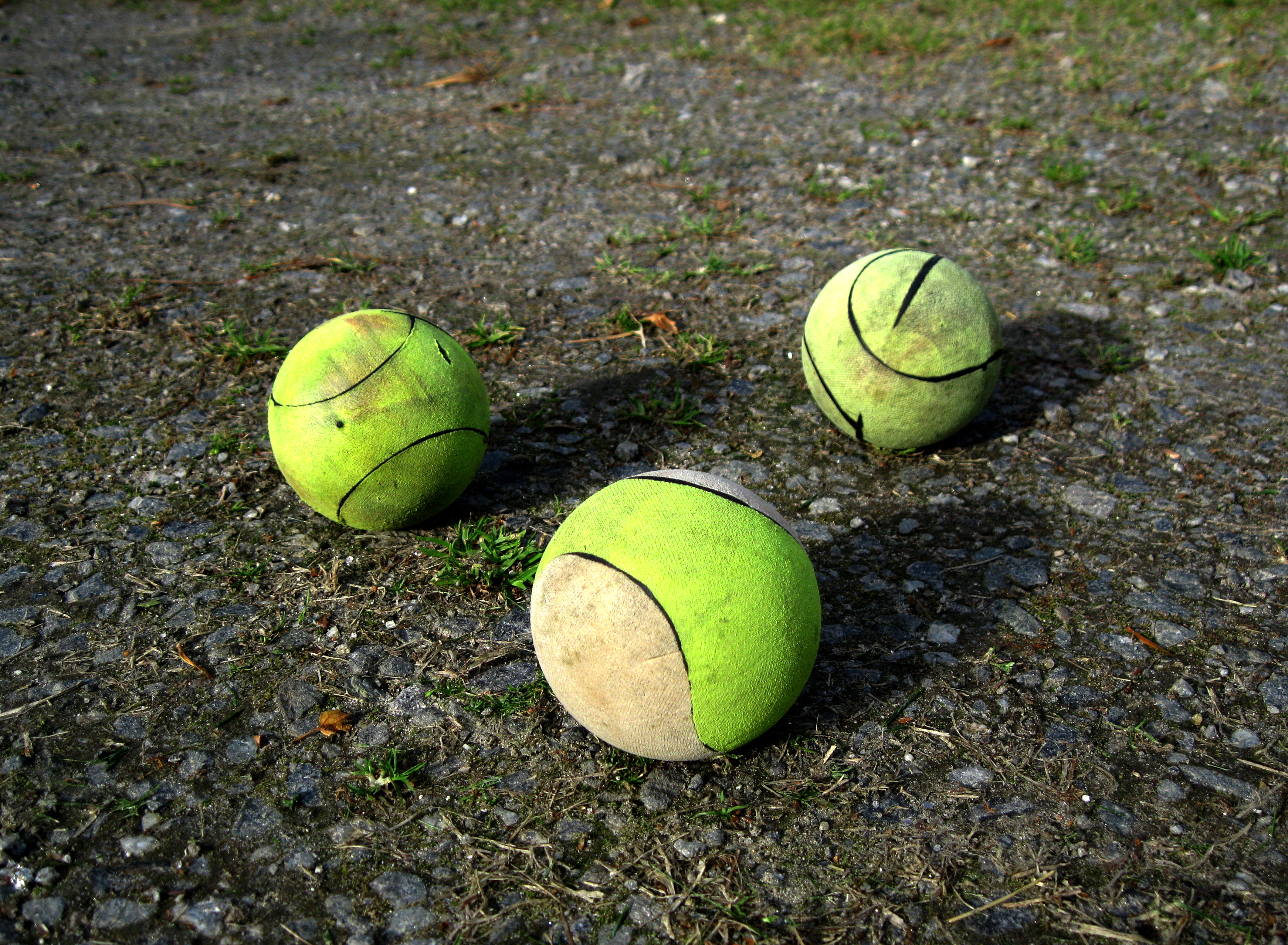 Pesäpallon pelipalloja.